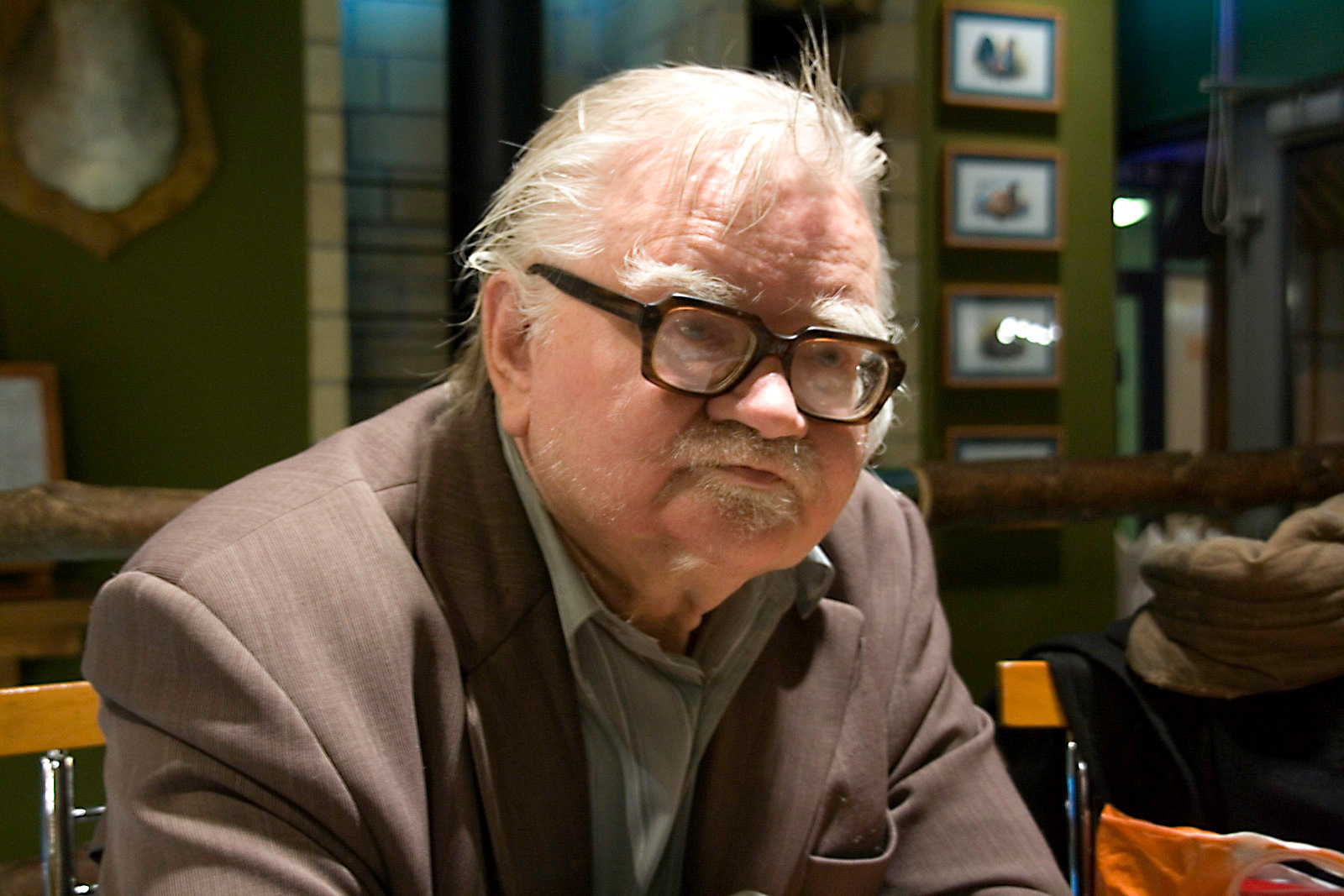 Janusz Styczeń, polski poeta